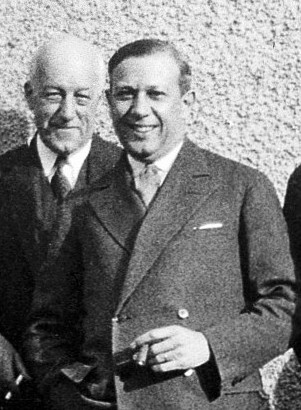 H.E. Sigerist